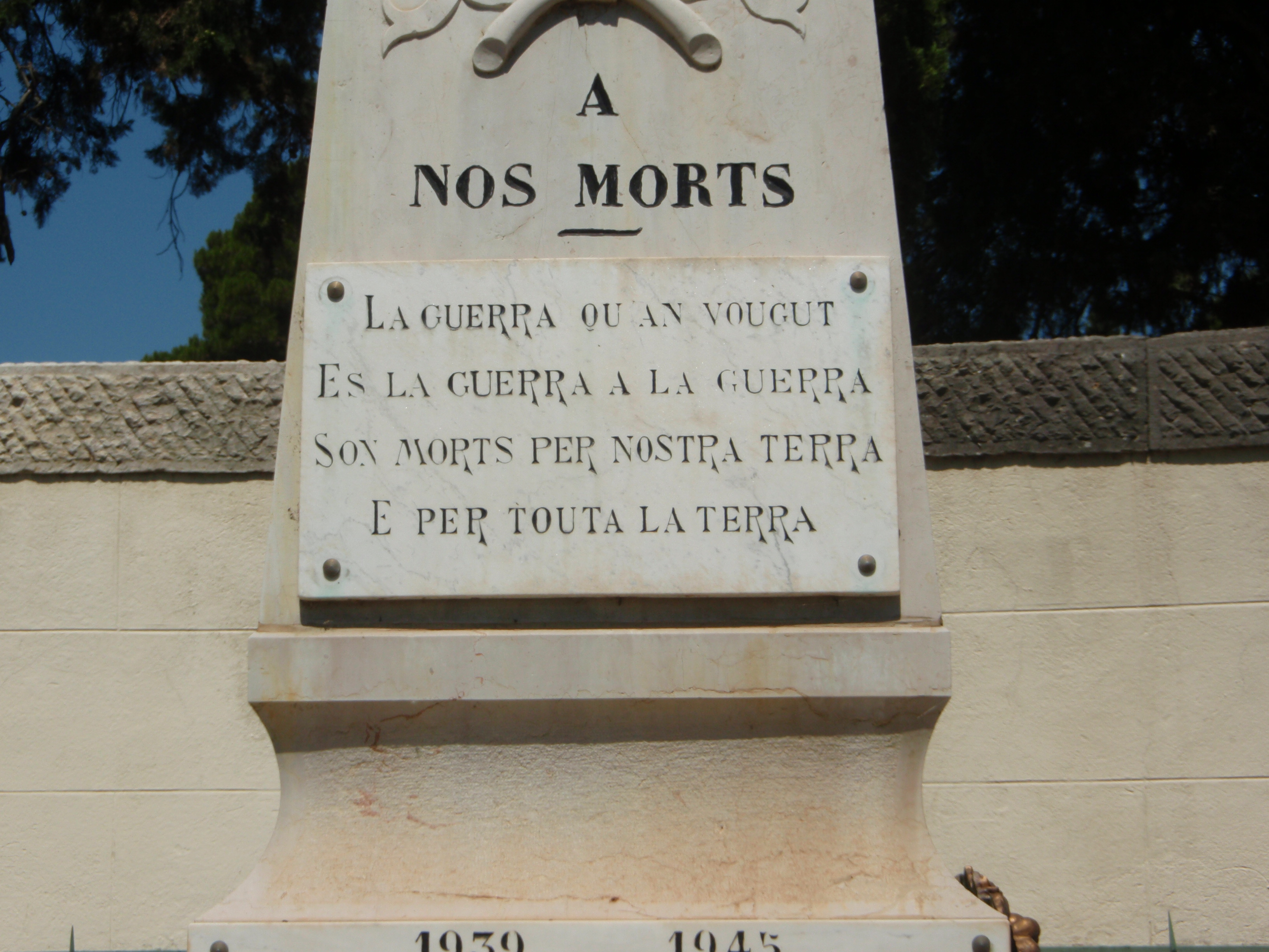 Aniane (Hérault) - Monument aux morts de la guerre 1914-1918 réalisé dans les années 1920. Texte en occitan :La guerra qu'an vougutEs la guerra a la guerraSon morts per nostre terraE per touta la terra Traduction en français :La guerre qu'ils ont vouluC'est la guerre à la guerreIls sont morts pour notre terreEt pour toute la terre